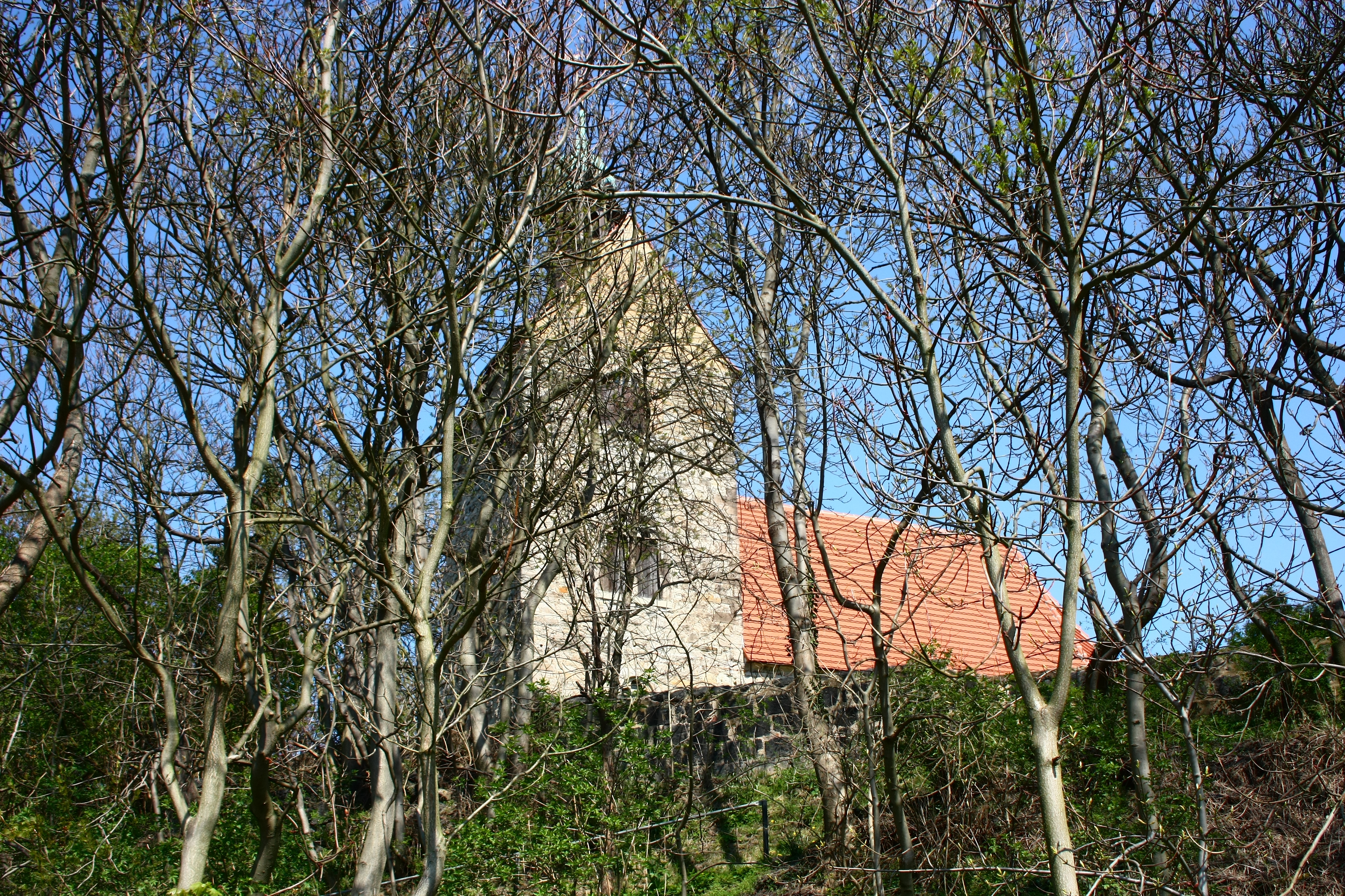 die Dorfkirche von Gorsleben bei Schochwitz